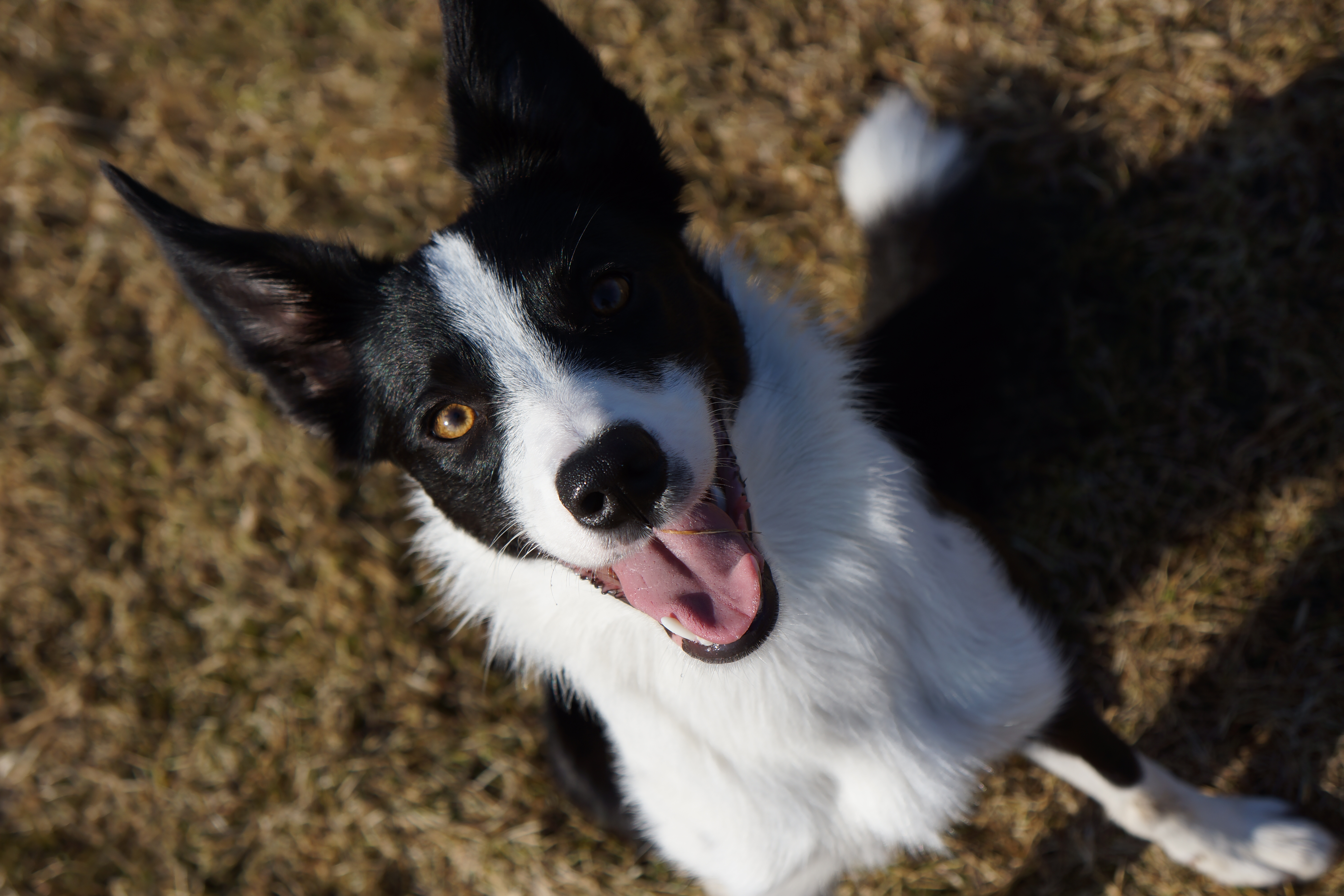 Trumpaplaukis borderkolis Hulu